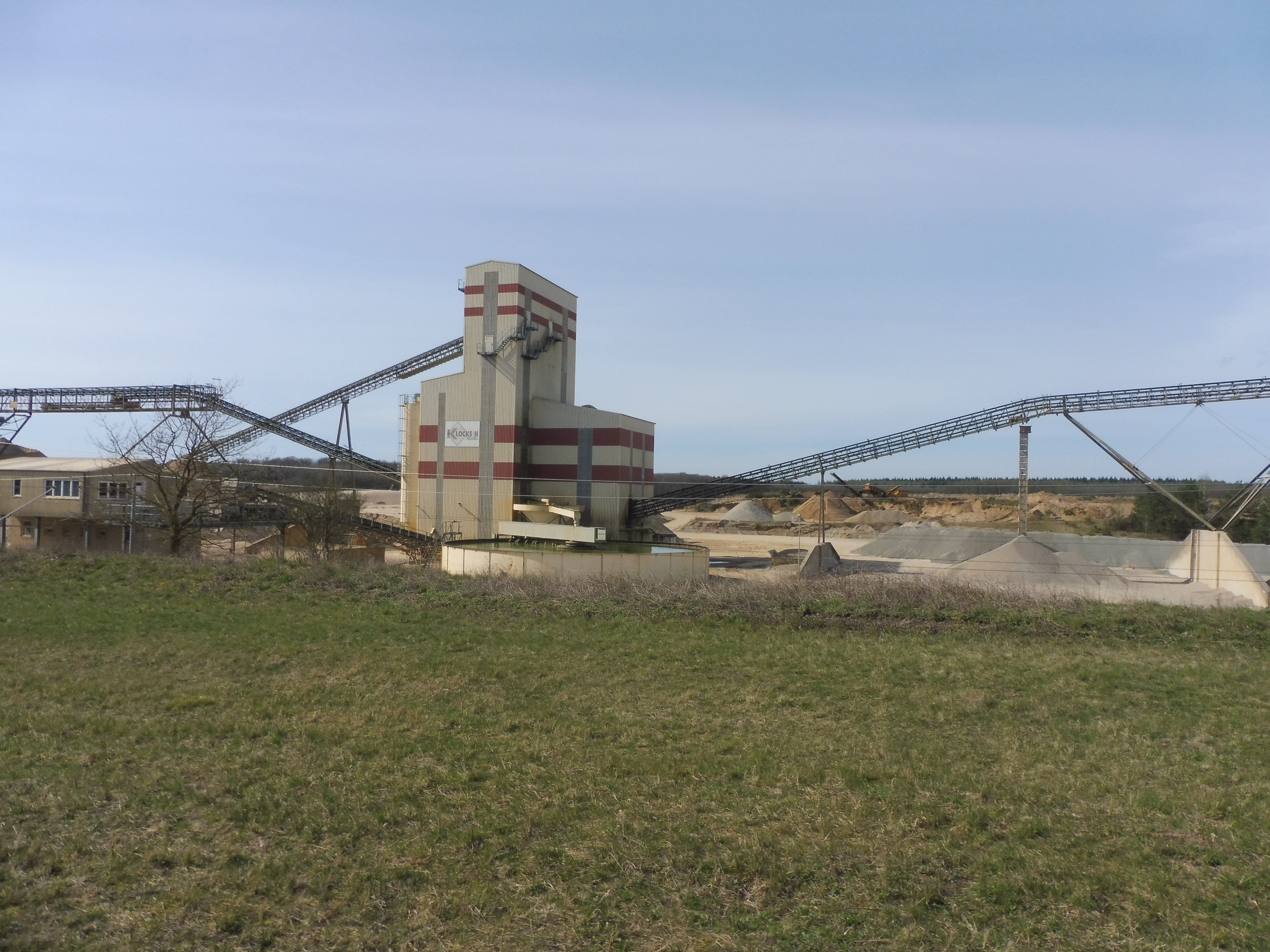 Kies- und Sandwerk Klocksin bei Blücherhof, Mecklenburg